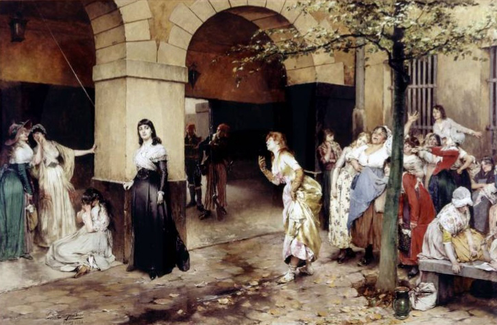 Les prisonnières se moquent de Madame Roland (1754-1793) dans la prison de Sainte Pélagie (Paris)